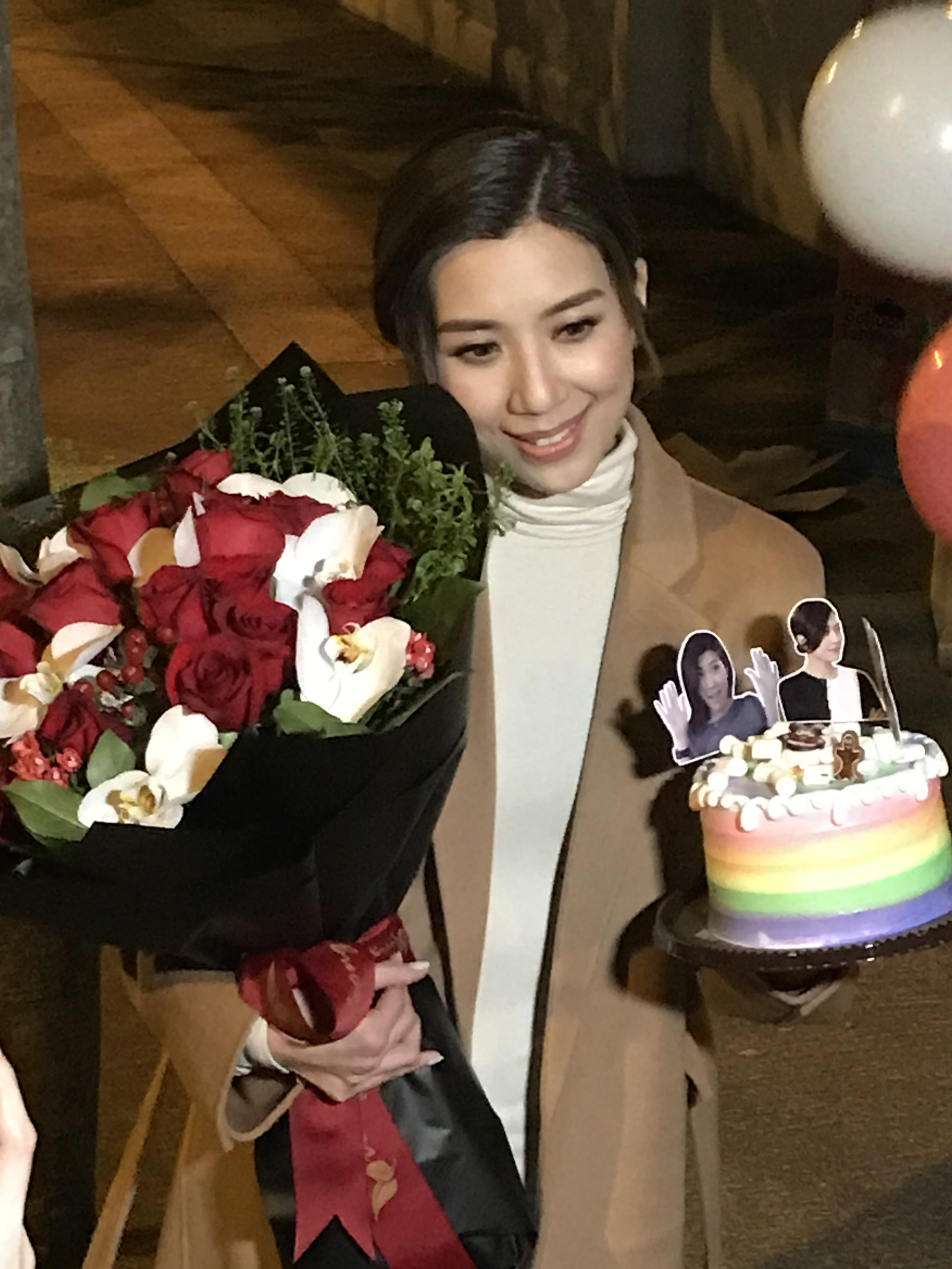 攝於2018年12月17日, 將軍澳電視廣播城門外